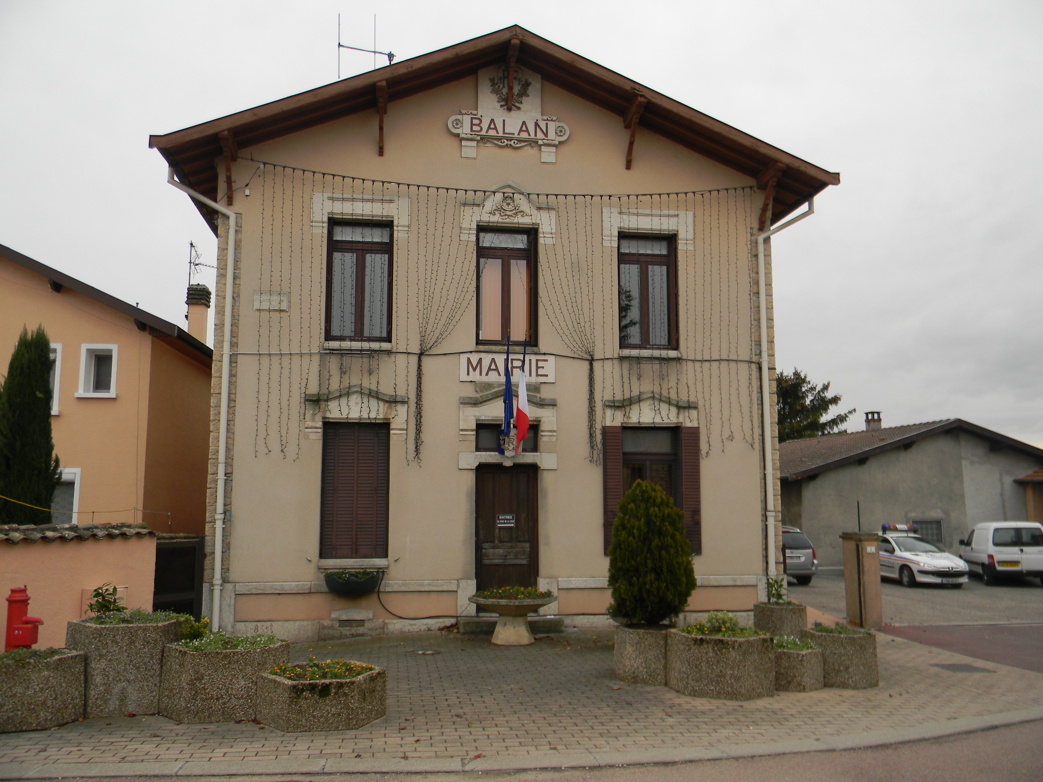 Vue de face de la mairie de Balan, dans l'Ain.